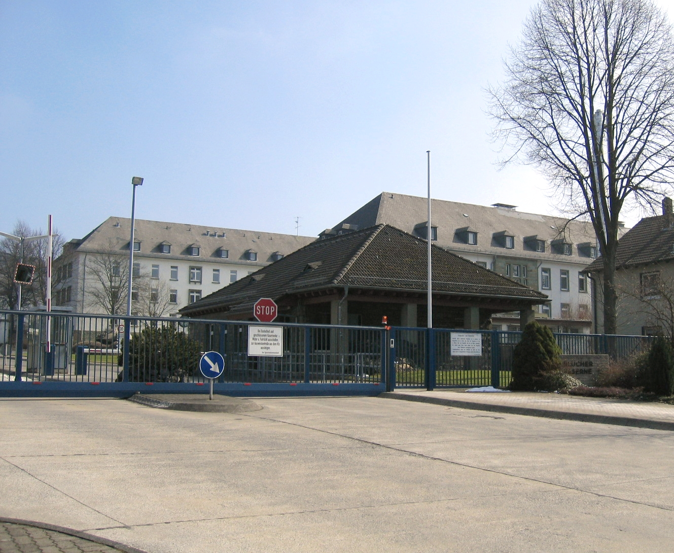 Description: Blücher-Kaserne in Hemer Source: selbst fotografiert Date: 19. März 2006 Author: Bubo